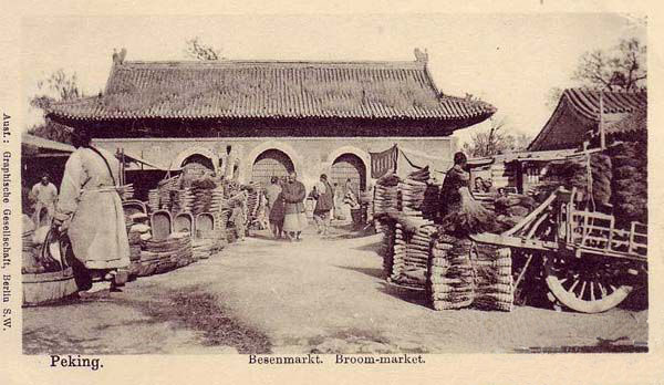 隆福寺山门前的摊位